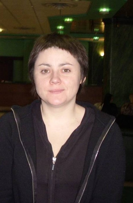 Maria Peszek, ps. Mania, (ur. 9 września 1973 we Wrocławiu) - polska aktorka i piosenkarka.